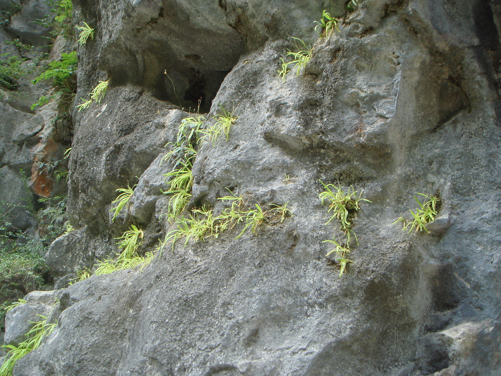 Pinguicula longifolia subsp. longifolia. Hábitat. Valle de Añisclo, Pirineos, (Huesca), España.